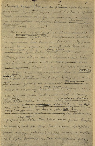 Черновый [черновой] набросок декларации 10 февраля 1918 года